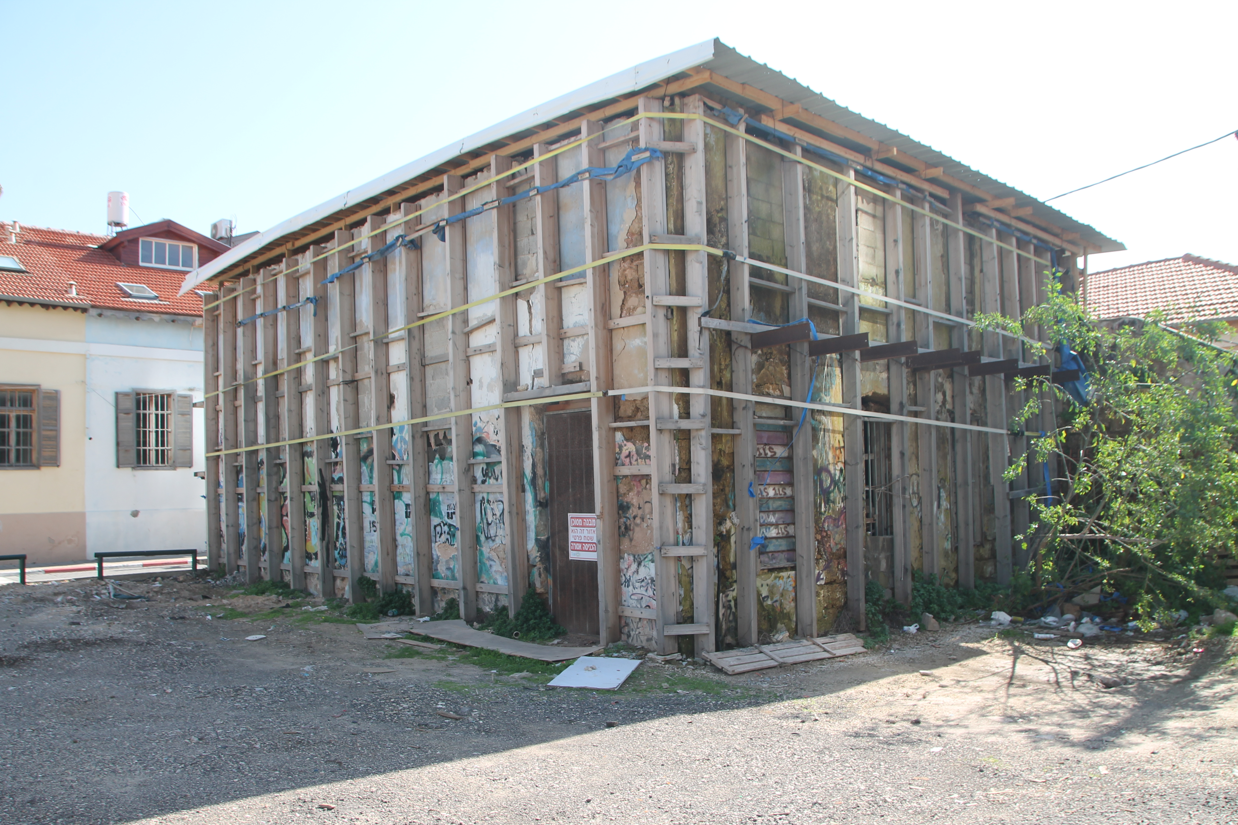 בית הכנסת אוהל יצחק (תל אביב